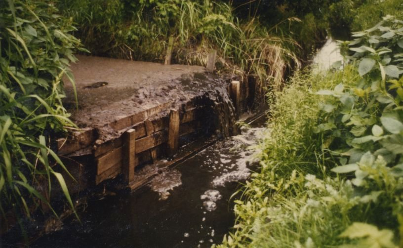 Faulschlammeinleitung in Moorkanal; Hetthorn, Einheitsgemeinde Loxstedt, Landkreis Cuxhaven, Niedersachsen.